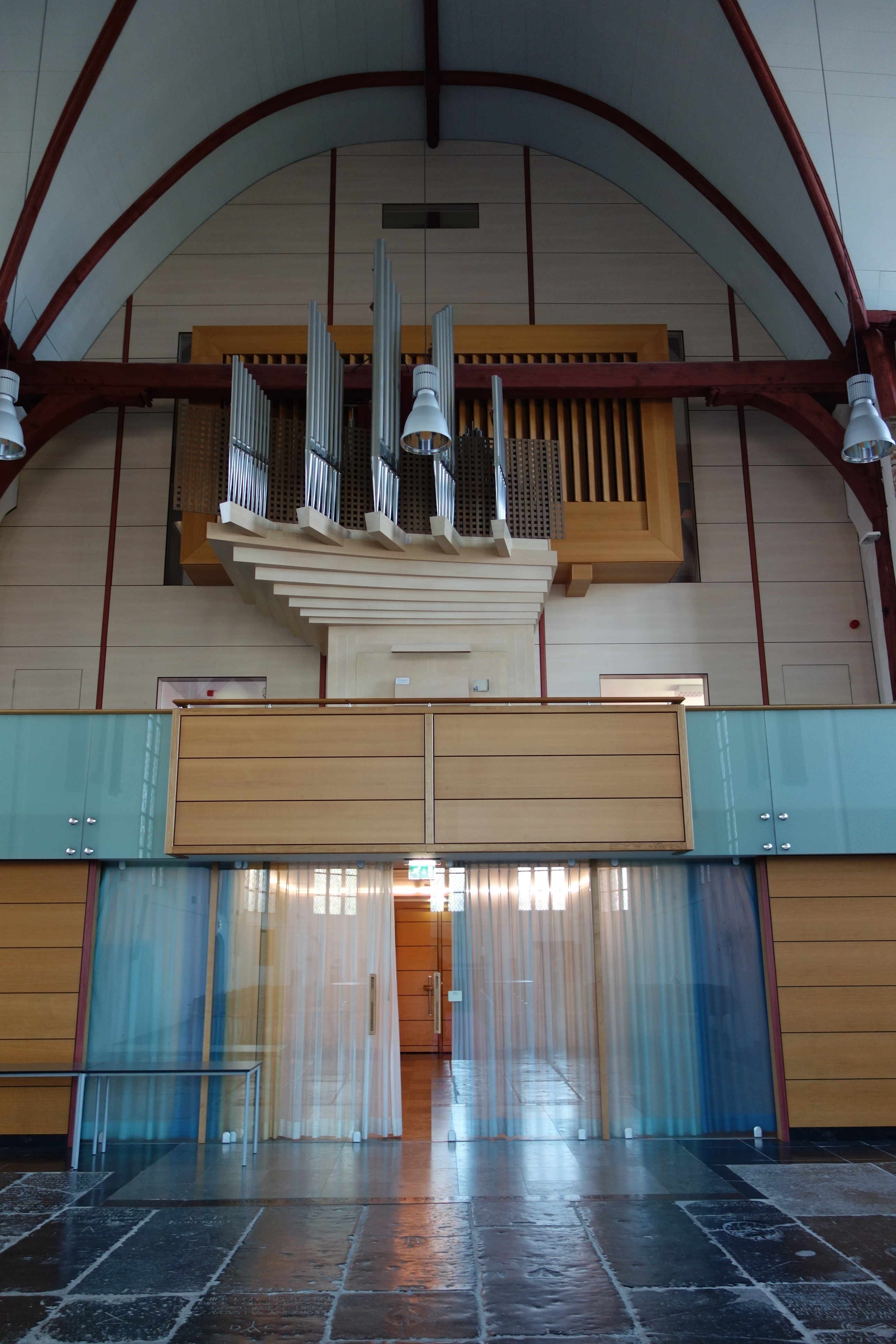 Tot de brand in 2003 had de Hervormde kerk van Venhuizen een Van Dam-orgel. Na de brand kreeg het dit nieuwe orgel: een Pels & Van Leeuwen uit 1994. Het orgel is van origine geen kerkorgel, maar stond bij een particulier in een L-vormige ruimte (daarom zijn de pijpen ook naar rechts gedraaid).